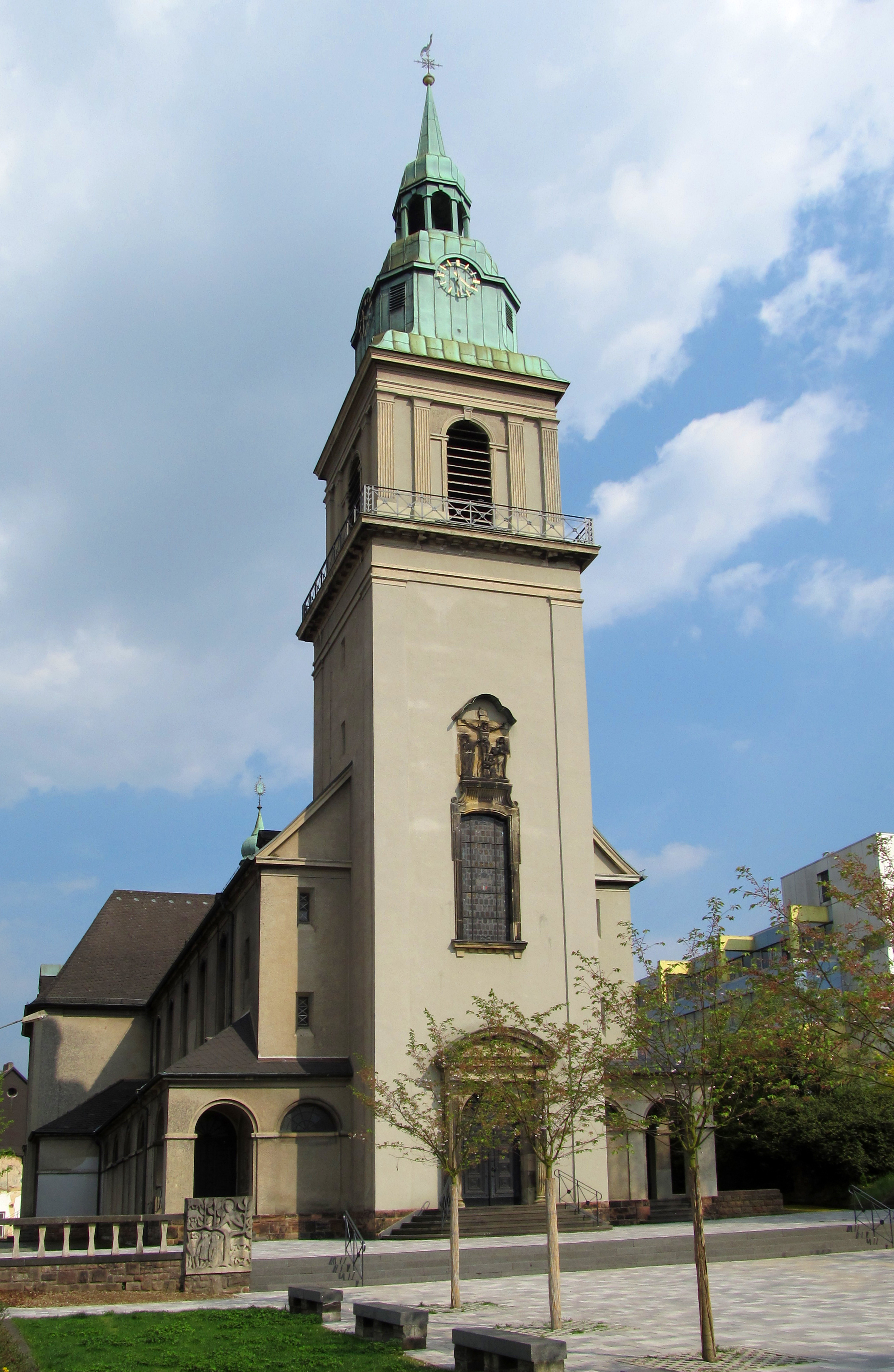 Die katholische Pfarrkirche Hl. Dreifaltigkeit in Wiebelskirchen, einem Stadtteil von Neunkirchen (Saar), Saarland